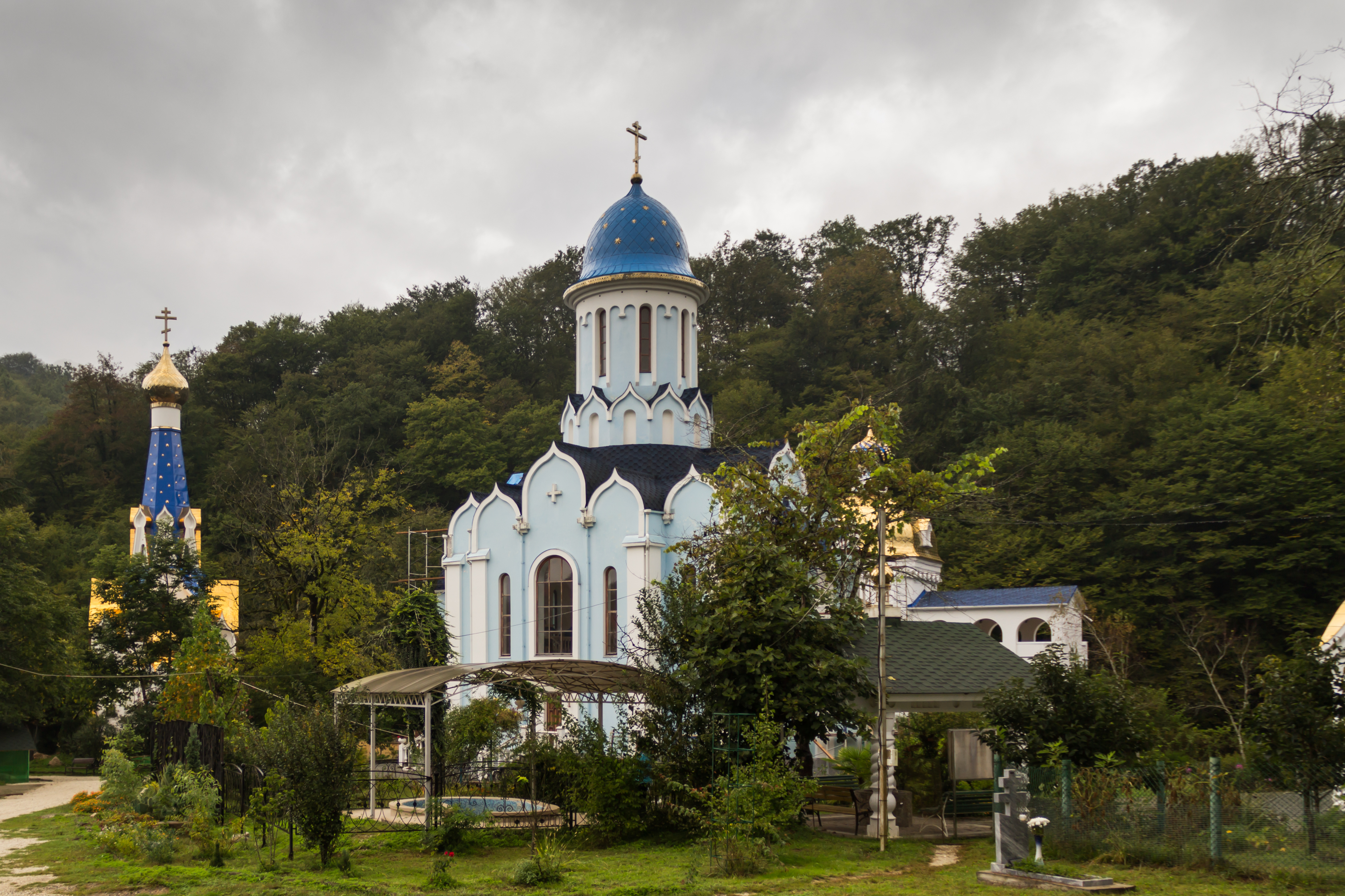 Lesnoye, Krasnodarskiy kray, Russia, 354386